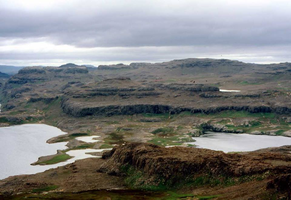 Lac d'Armor, avec le sommet du volcan du Diable, Grande Terre, îles Kerguelen